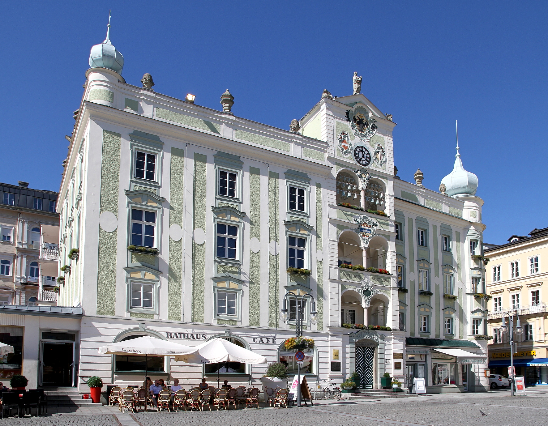 Das Rathaus in der oberösterreichischen Stadt Gmunden.